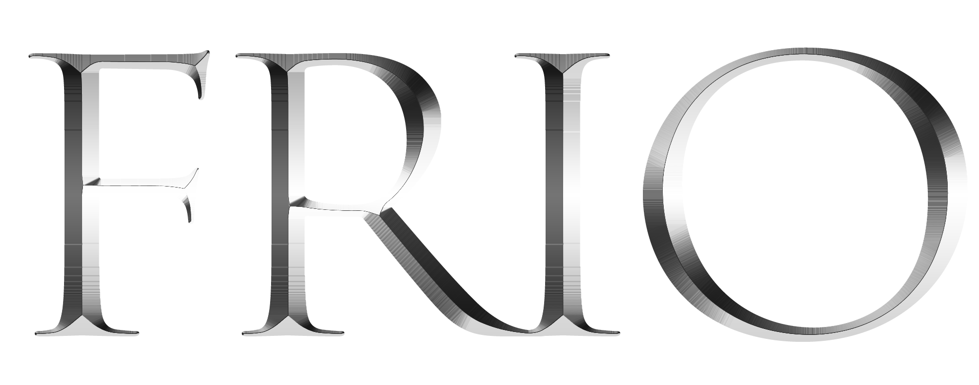 Logo Oficial de FRIO